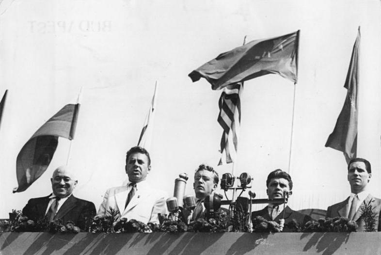 Budapest, II. Weltfestspiele, Festumzug, Ehrentribüne Weltjugendspiele in Budapest beendet-Am 28.August 1949 verabschiedeten sich die ausländischen Delegierten der Weltjugendspiele von Budapest und seiner gastfreundlichen Bevölkerung.Eine große Schlußdemonstration, an der sich alle Delegierten beteiligten, bildeten den Abschluß der Festspiele.In endlos scheinenden Zügen zogen die Delegierten der einzelnen Nationen durch die Straßen der ungarischen Hauptstadt zum Heldenplatz, wo der stellv.Ministerpräsident Matyas Rakosi eine Ansprache hielt.Die Vertreter der Weltjugend gelobten dort, daß sie ihren Kampf für den Frieden bis zum Sieg fortsetzen werden UBz Ehrentribüne am Heldenplatz: v l n r : Mátyás Rákosi, stellvertr.Premierminister, Generalsekretär der ungarischen Arbeiterpartei und Vorstizender der Volksfront; N. A. Mikhailov, Generalsekretär des Komsomol; J.Grohmann, Generalsekretär der Internationalen Studentenvereinigung; George Non, Präsident der Minsz (Volksunion der ungarischen Jugend); Guy de Boisson, Präsident des Weltjugendbundes.Foto:Illus